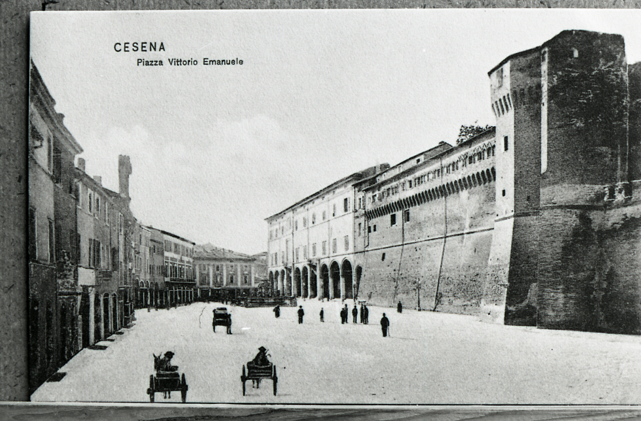 Servizio fotografico : Forlì, 1972 / Paolo Monti. - Strisce: 7, Fotogrammi complessivi: 38 : Negativo b/n, gelatina bromuro d'argento/ pellicola ; 35 mm. - ((Sul portanegativi: NIKMAT PanF. - Il primo fotogramma della prima striscia è il n. 43, il secondo non è numerato; la numerazione ordinaria incomincia dal terzo fotogramma della prima striscia (1A-2). - I fotogrammi presentano una doppia numerazione (es. 1A-2; 2A-3; 36A-37...). - Il fotogramma n. 43 è in parte tagliato e la prima parte da sinistra è completamente sovraesposta, rendendo la porzione di pellicola illeggibile. - Il fotogramma n. 37A-38 è vuoto. - Occasione: Campagna di rilevamento (prima) del centro storico. - Fonte: Agenda di Paolo Monti: Leica 1501-3000 Controllo numerazione (1950-1978), presso Archivio Paolo Monti. - Fonte: Monografia di Dradi Maraldi Biagio, Emiliani Andrea (a cura di): Cesena: il volto della città, Cesena, Banca Popolare di Cesena (1973). - Fonte: Agenda di Paolo Monti: 1972 (1972), presso Archivio Paolo Monti